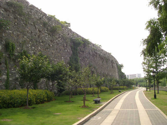 閲江楼 明代城壁 2004年4月16日撮影 撮影者：権作 参照：